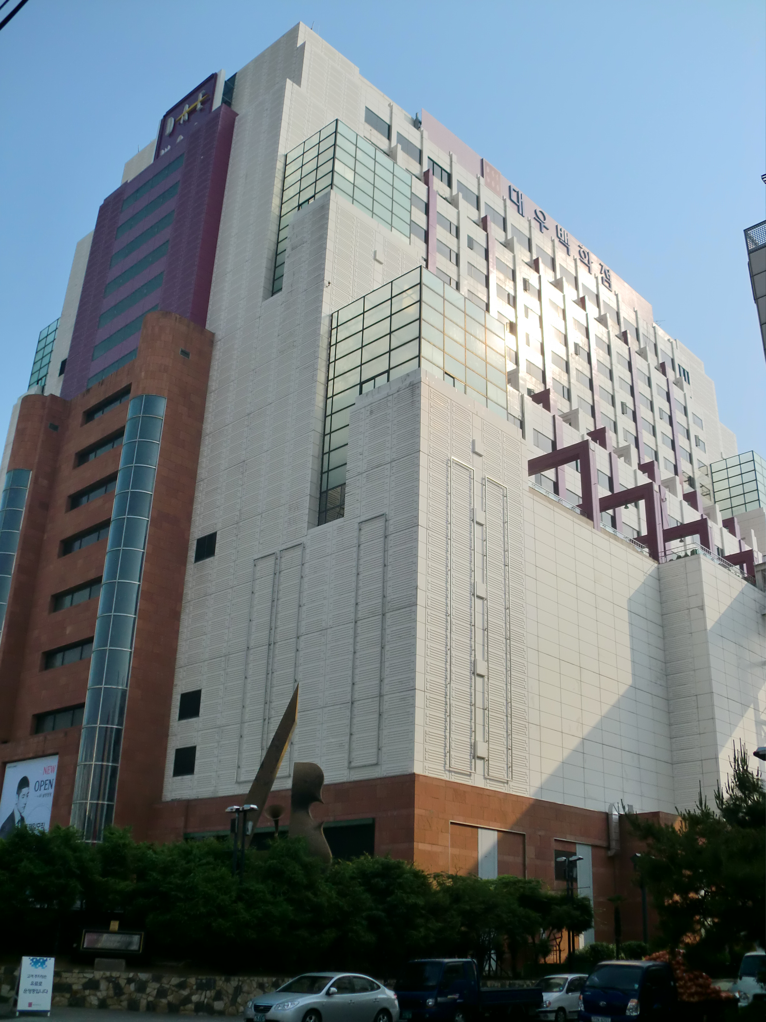 경상남도 창원시에 있는 대우백화점